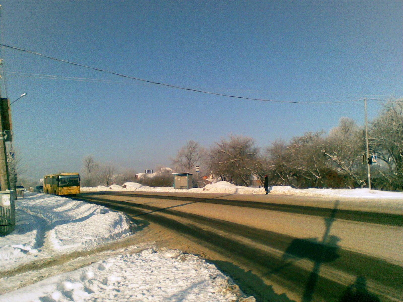 Вінницьке шосе у Хмельницькому: Вінницьке шосе у Хмельницькому